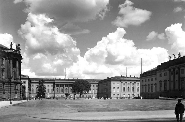 Berlin Universität vom Kaiser-Franz-Joseph-Platz aus.